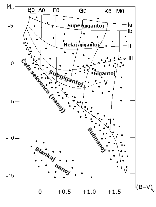 Skizo de Diagramo de Hertzsprung-Russell. Laŭ :de:H-R-Diagramm.png kaj :Dosiero:H-R_diagram.png.